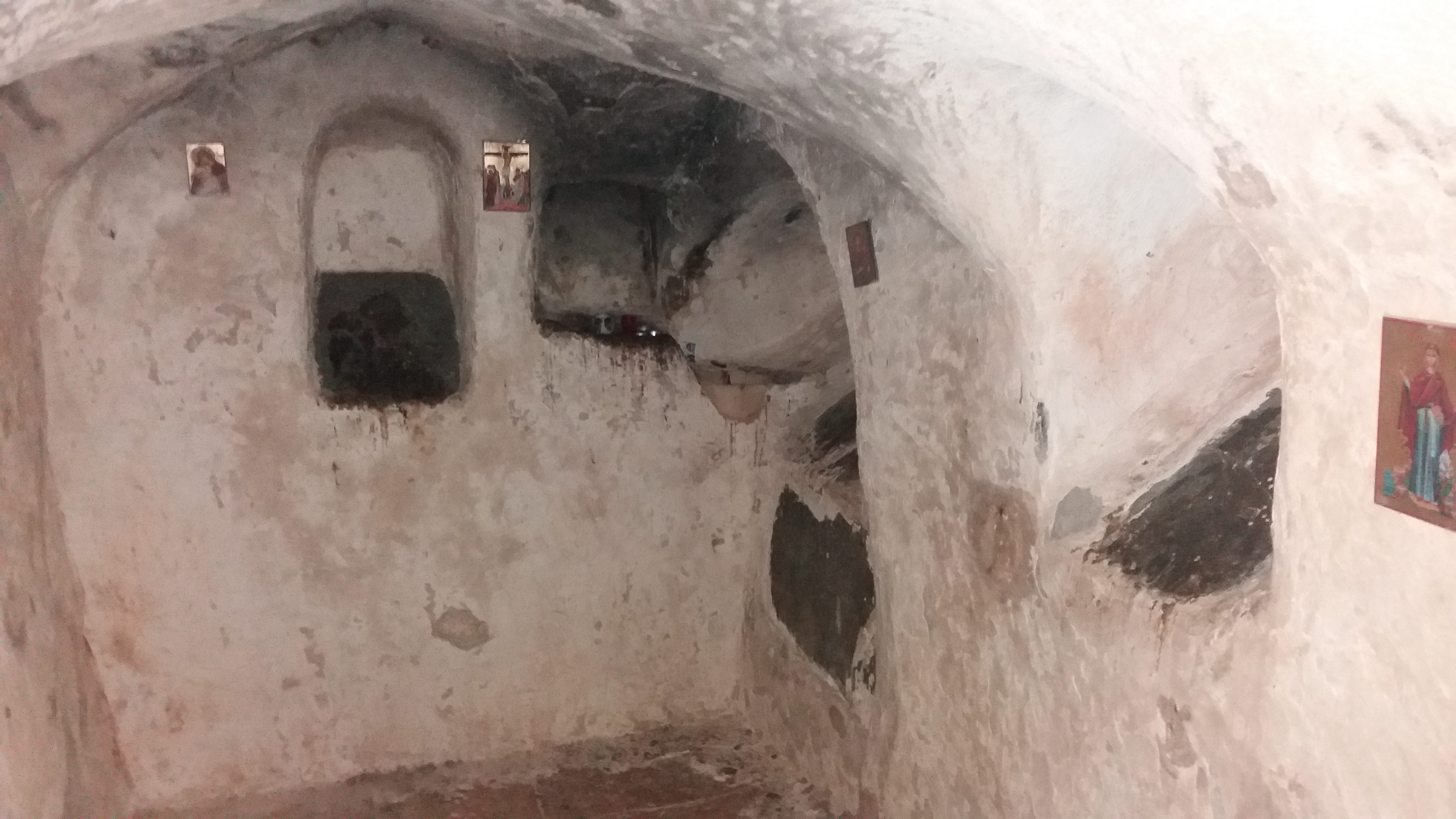 Zu sehen ist der Teil der Krypra des Klosters Mor Augin, in dem er selbst (Mor Augin) und seine zwei Schwestern beigesetzt wurden.